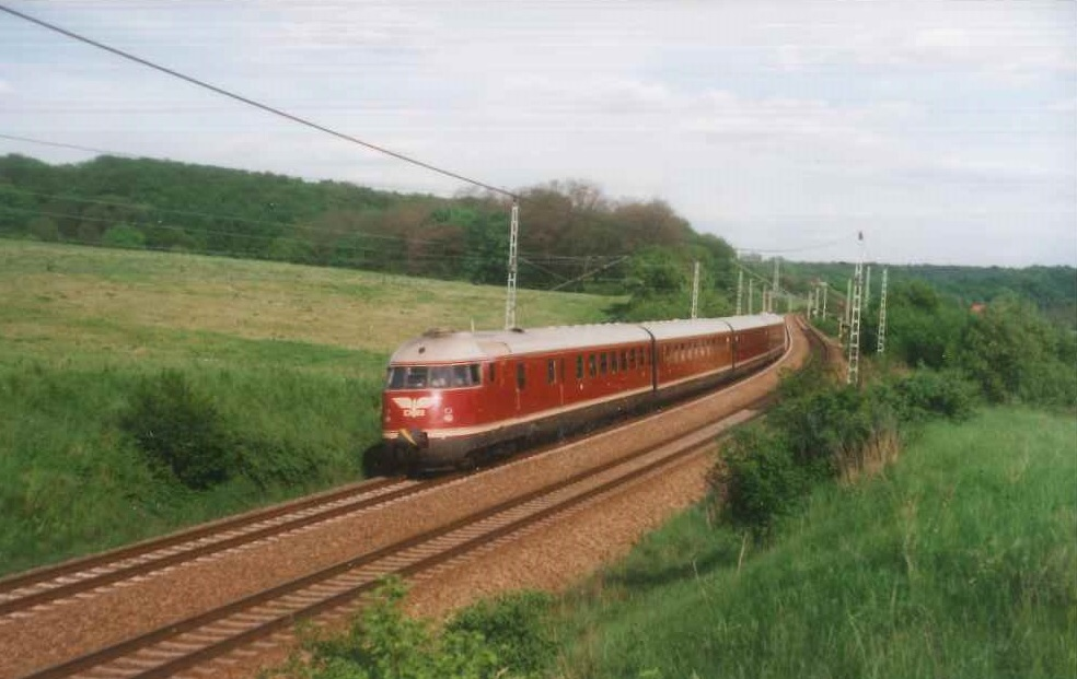 DB VT 08.5 auf einer Sonderfahrt bei Niederau